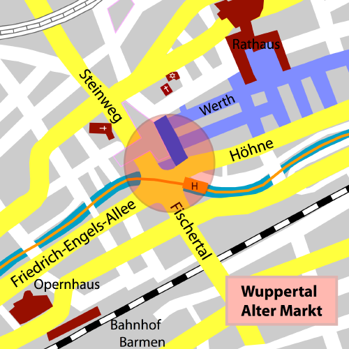 Skizze des Alten Markt, Wuppertal-Barmen